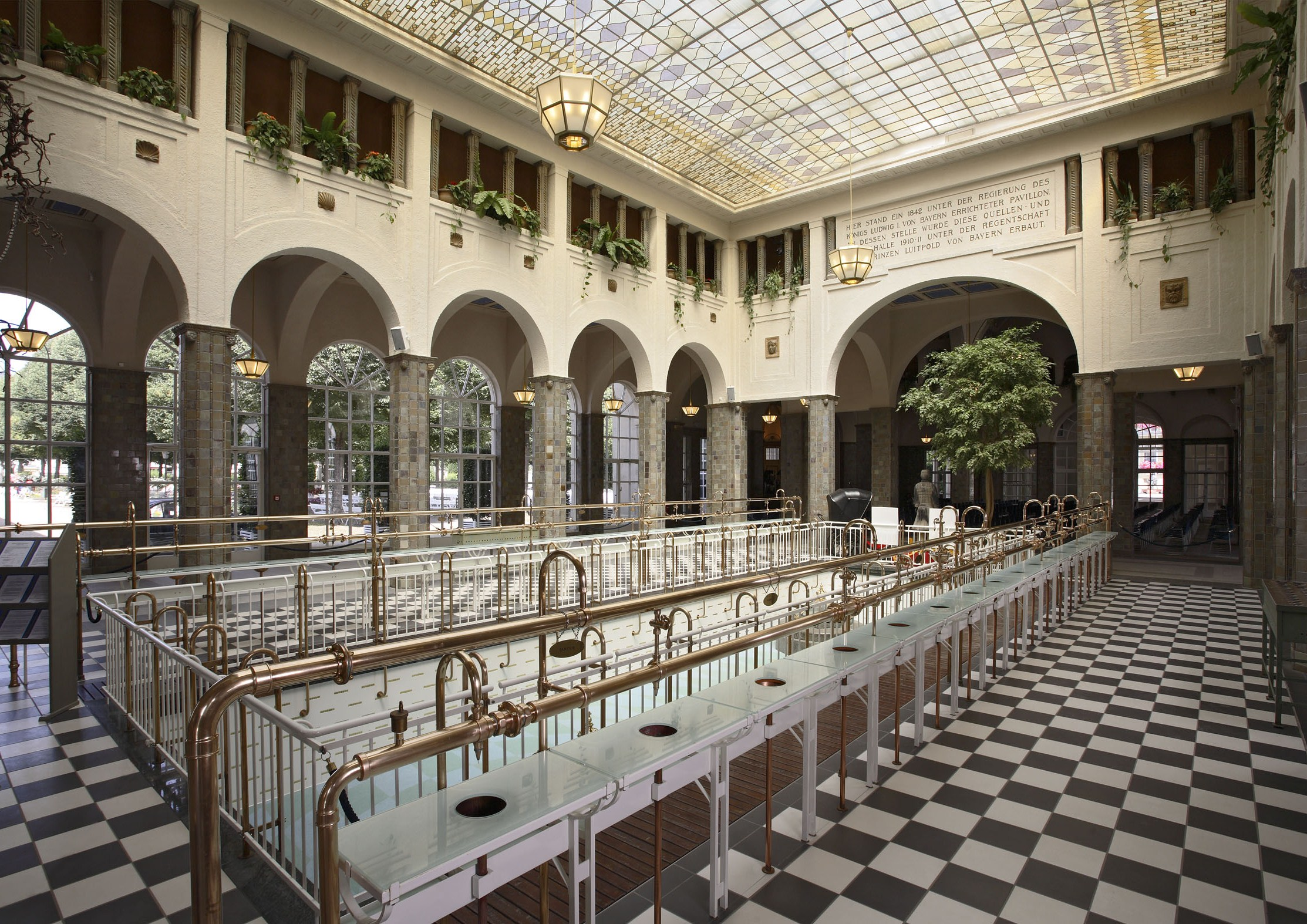 Die Brunnenhalle mit angrenzender Wandelhalle im bayerischen Staatsbad Bad Kissingen, mit 3.240 m² die größte Trinkkurhalle der Welt